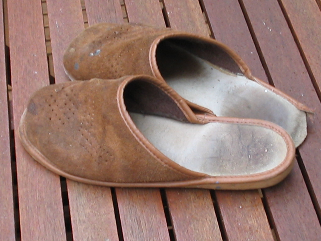 stel oude pantoffels